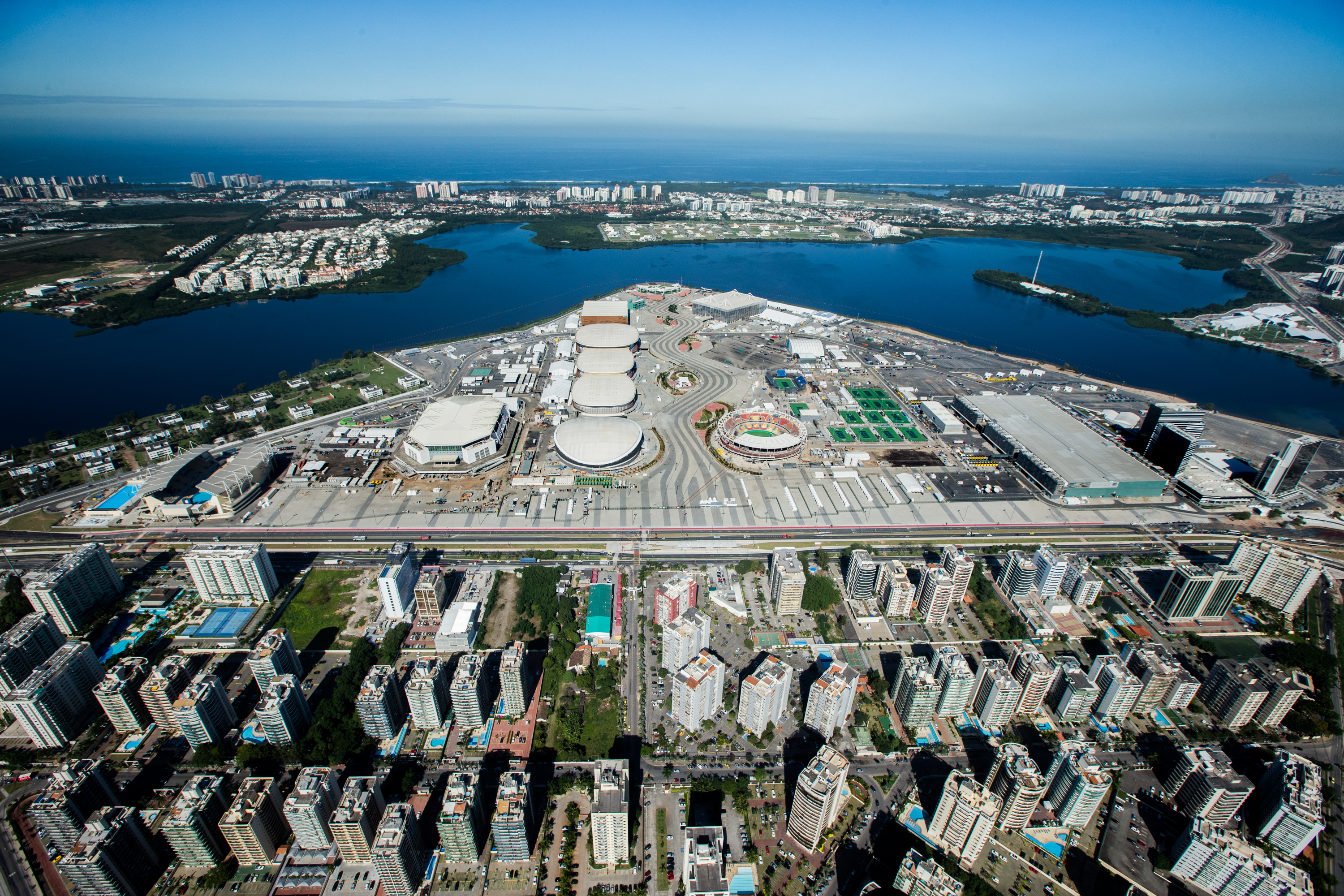 Parque Olímpico dos Jogos Olímpicos de 2016 na Barra da Tijuca